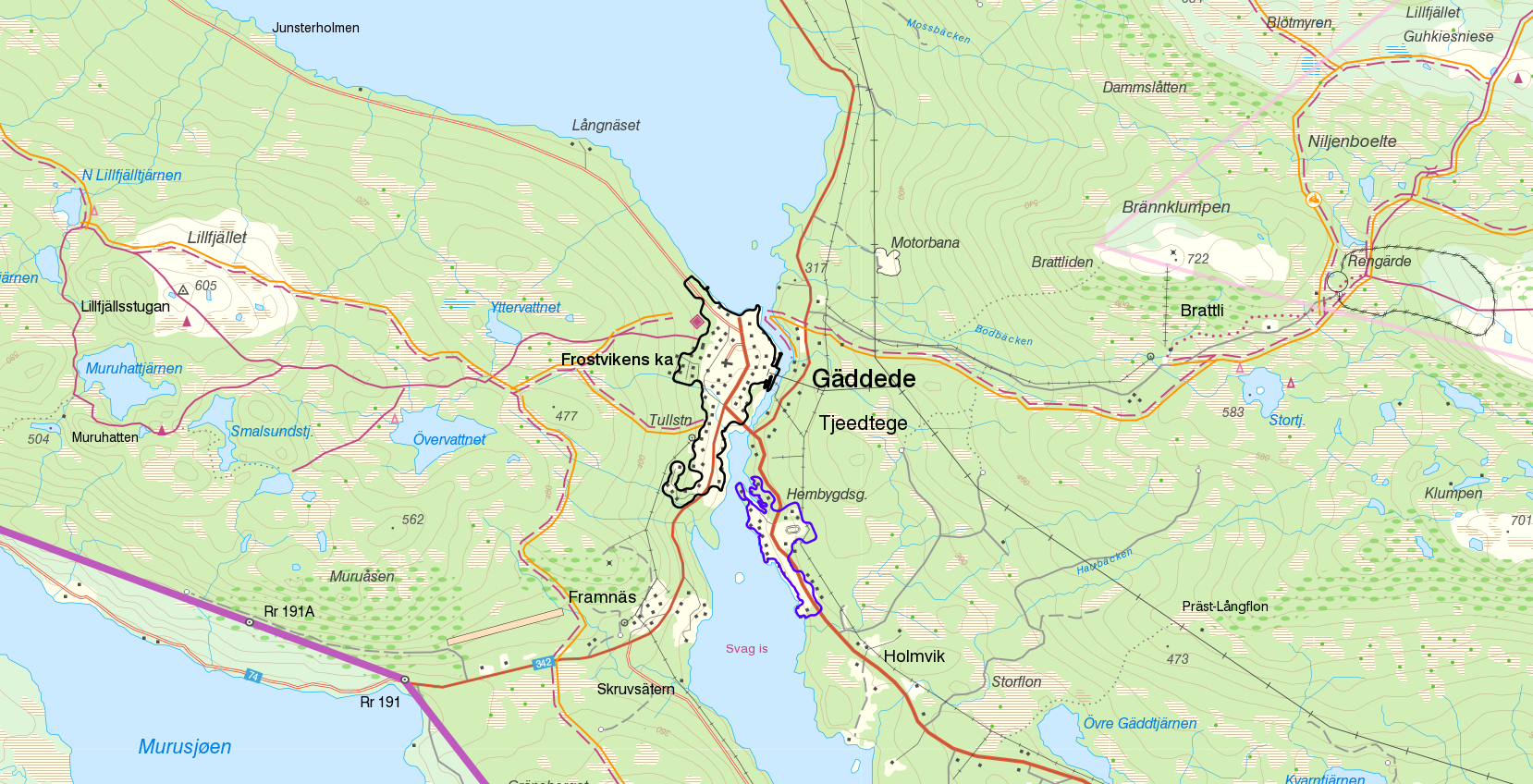 Gäddede tätort (svart gräns) och småort (lila gräns) 2015. Bakgrundskarta från Lantmäteriet, skala 1:30 236.